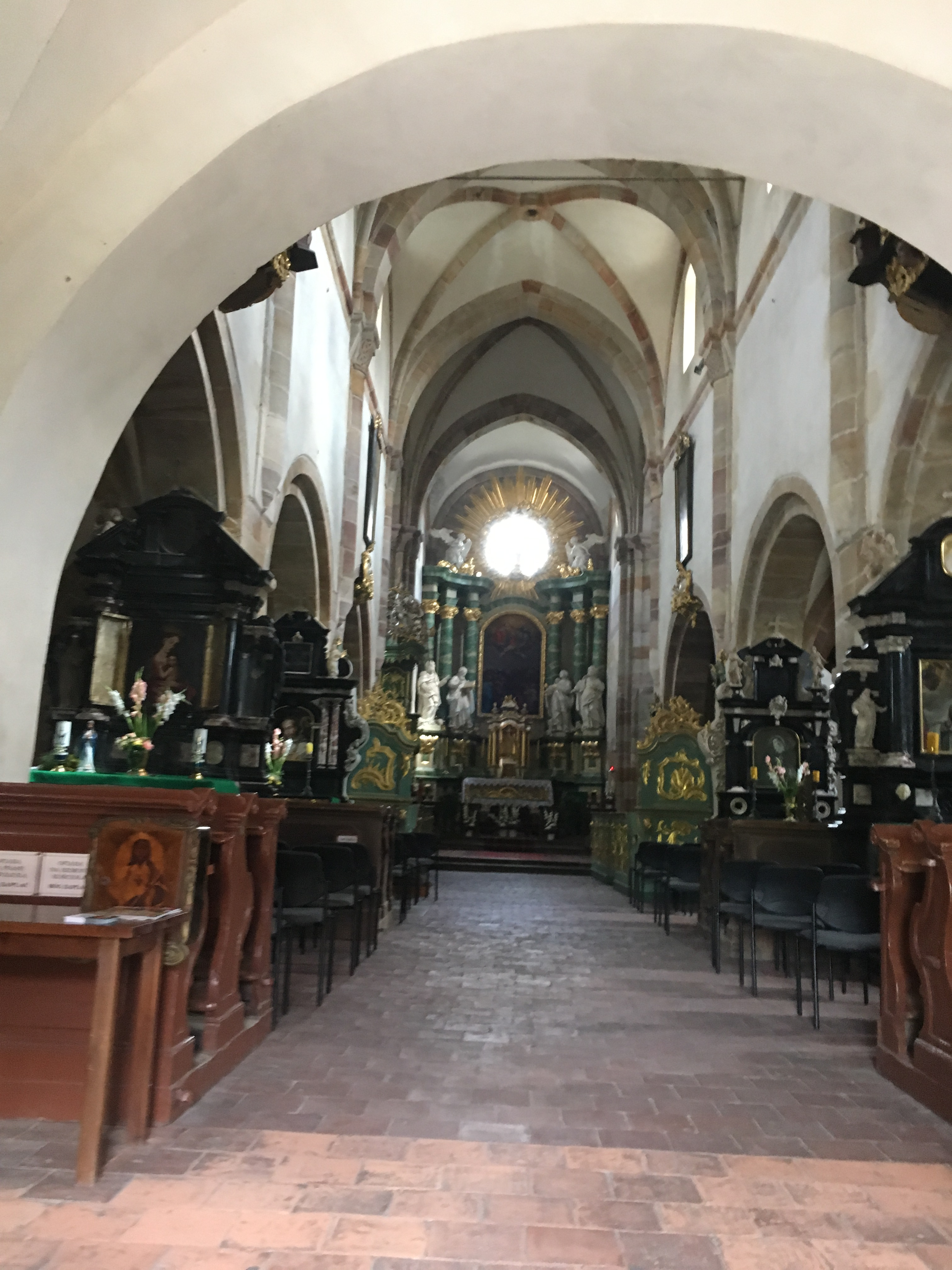 Bazylika św. Tomasza Kantauryjskiego (Becketa) w Sulejowie. Klasztor Cystersów. Kościół Romański. Wystrój Barokowo-Rokokowy.